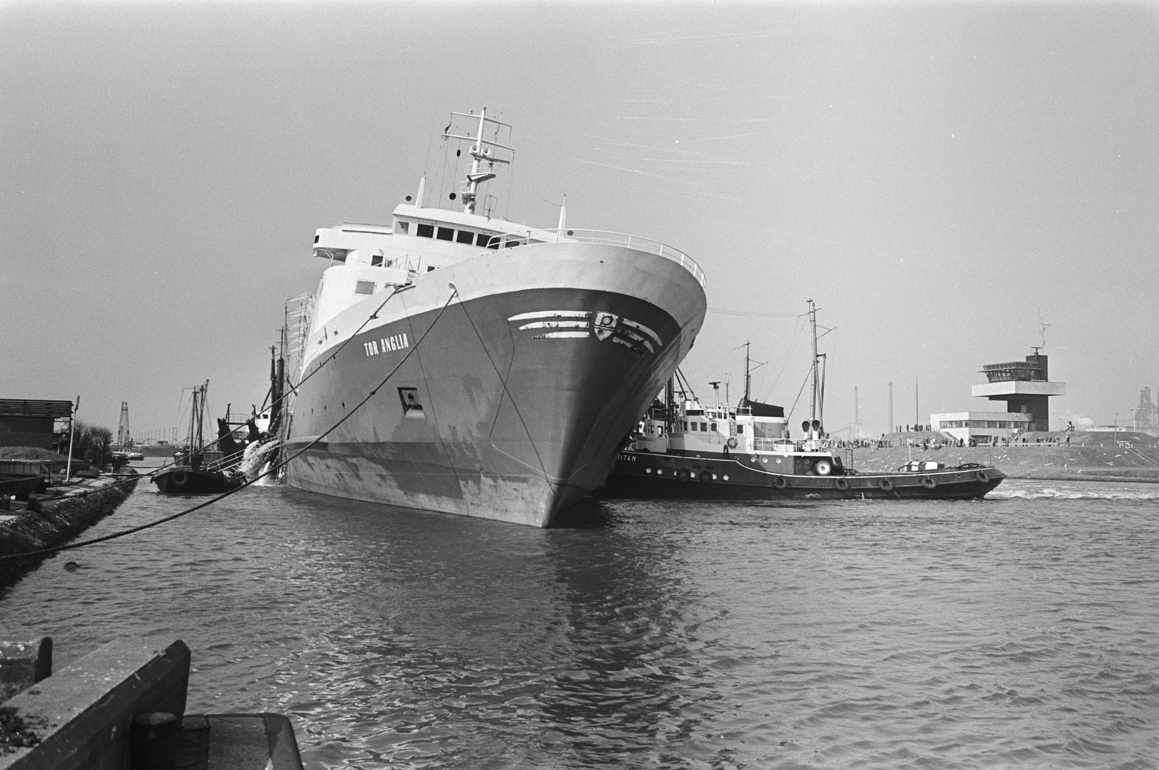 Collectie / Archief : Fotocollectie Anefo Reportage / Serie : [ onbekend ] Beschrijving : Tor Anglia lekgeslagen Datum : 21 maart 1976 Fotograaf : Croes, Rob C. / Anefo Auteursrechthebbende : Nationaal Archief Materiaalsoort : Negatief (zwart/wit) Nummer archiefinventaris : bekijk toegang 2.24.01.05 Bestanddeelnummer : 928-4757